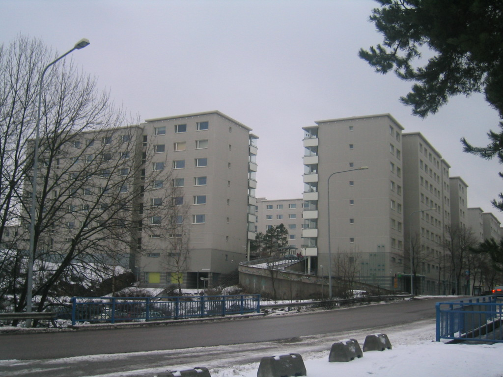 Pihlajiston kerrostaloja